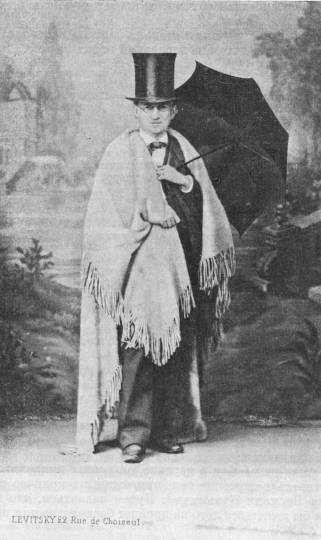 Ф.И. Тютчев. Париж